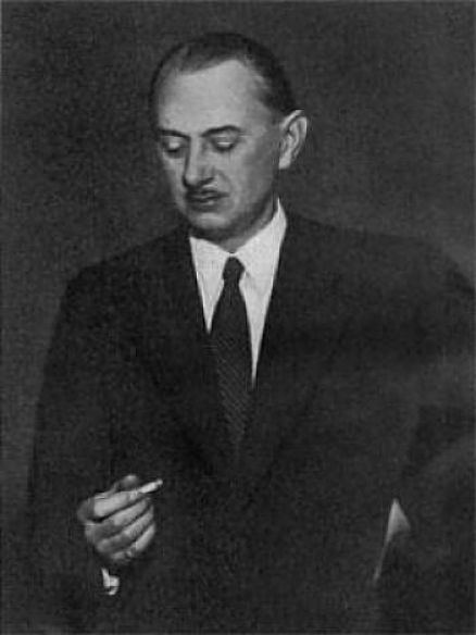 Ernest Tanrez, dit Ernestan, né à Gand le 15 juillet 1898 et mort à Bruxelles, le 17 février 1954 était un théoricien du socialisme libertaire et une figure importante de l'anarchisme belge.